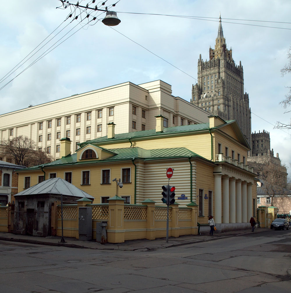 Denezhny lane, Moscow.